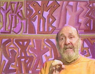 Portrait de Riccardo Licata